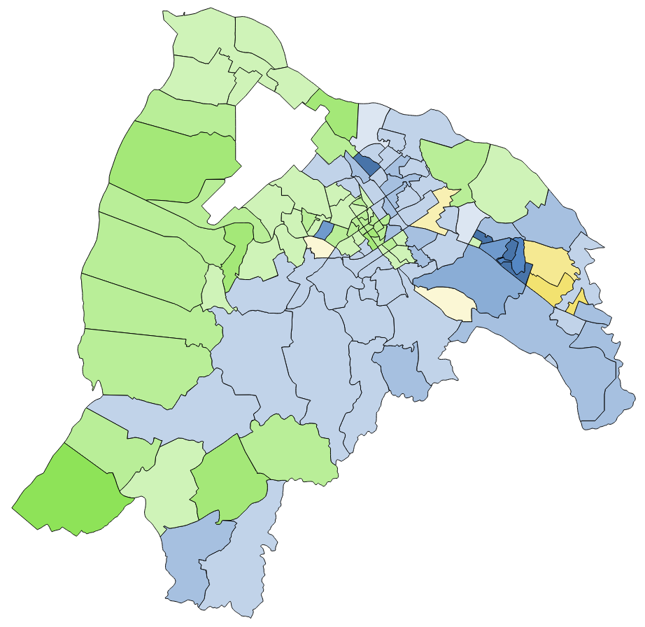 中文（台灣）: 顏色對照表 部分村里因共用投開票所 故圖中部分村里得票為依人口調整後資料